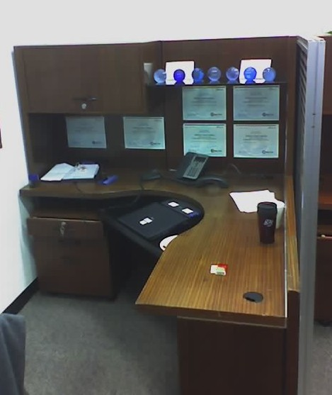 credenza desk